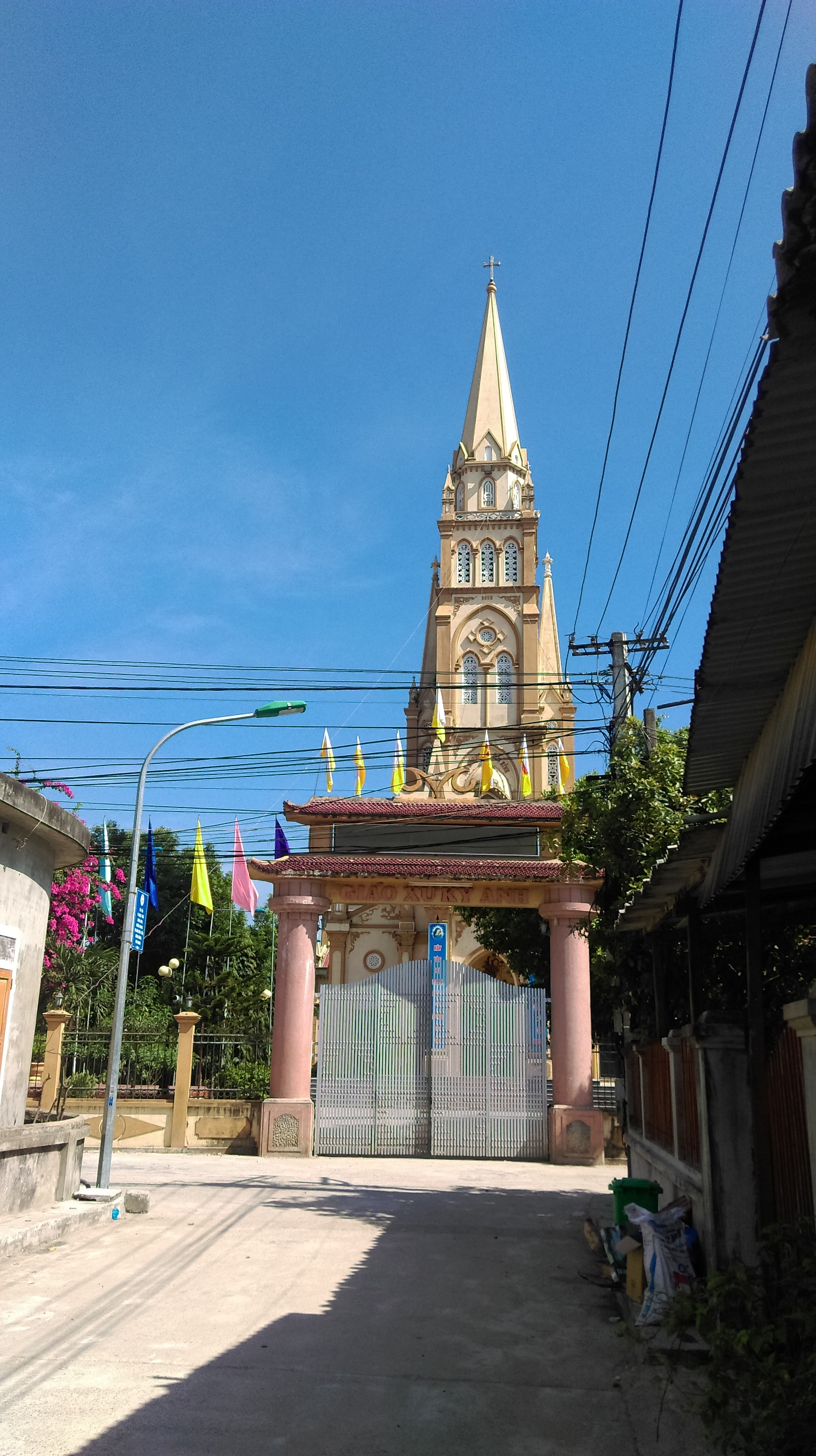 Nhà thờ Giáo xứ Kỳ Anh, Kỳ Châu, Kỳ Anh, Hà Tĩnh